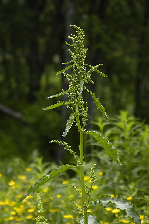 Høymuggel/Høymol (Rumex longifolius) ved Prestvannet i Tromsø. Foto: Krister Brandser